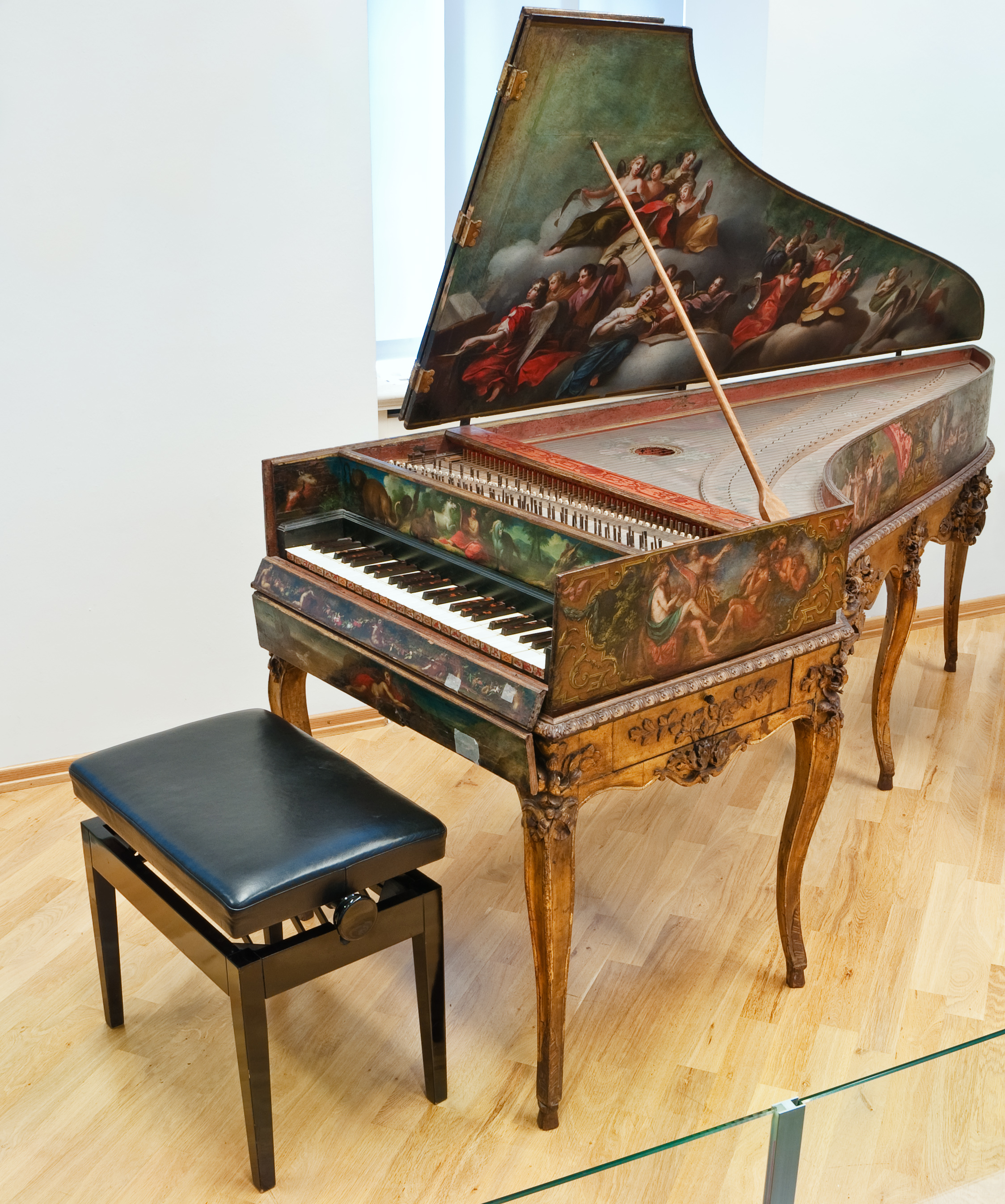 Dieses Einmanualige Cembalo wurde um 1716 von Carl Conrad Fleisher erbaut. Am Gehäuse, Bemalung und Unterbau zeigt dieses Instrument Veränderungen auf dem 19. Jahrhundert. Der Tonumfang dieses Cembalos beträgt C bis c3 und besitzt zwei 8' und ein 4'-Register.